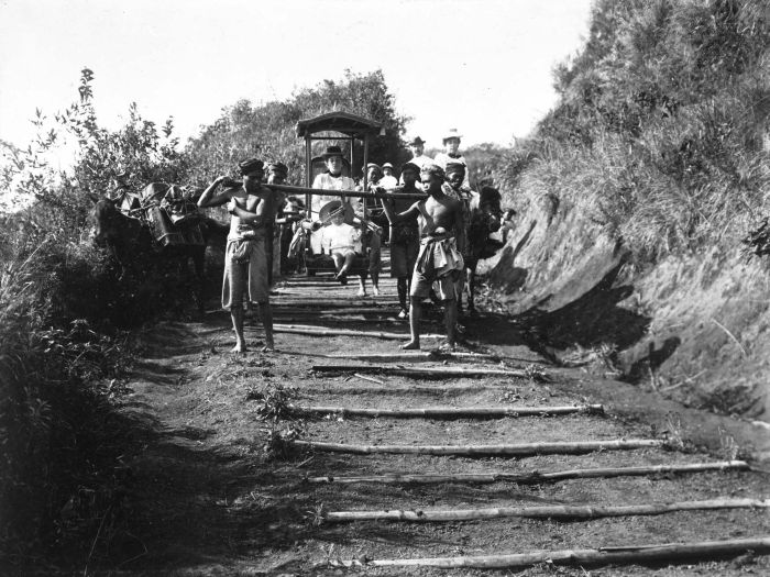 Foto. Een Armeense familie per draagstoel op weg naar Tosari